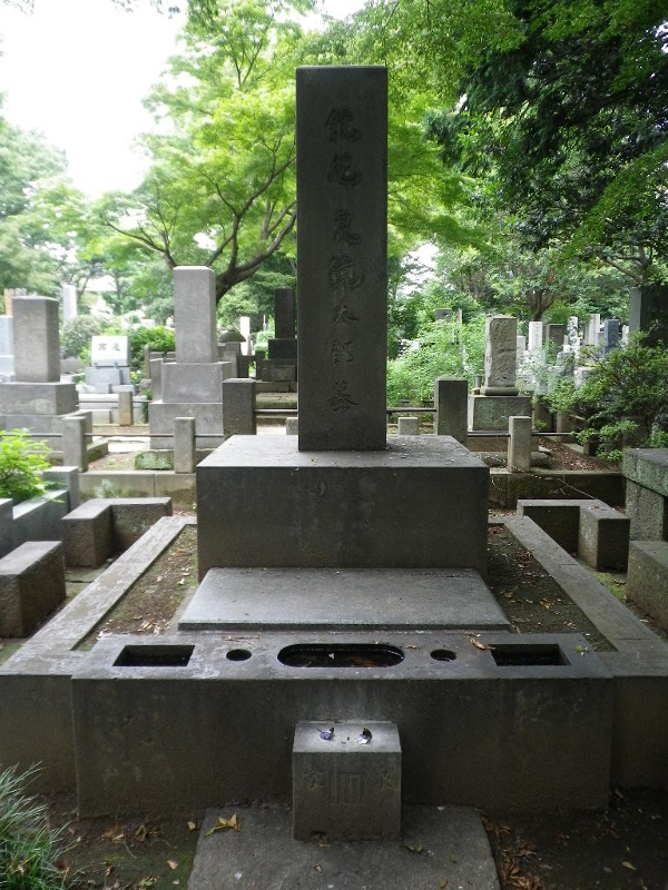 泉鏡花の墓